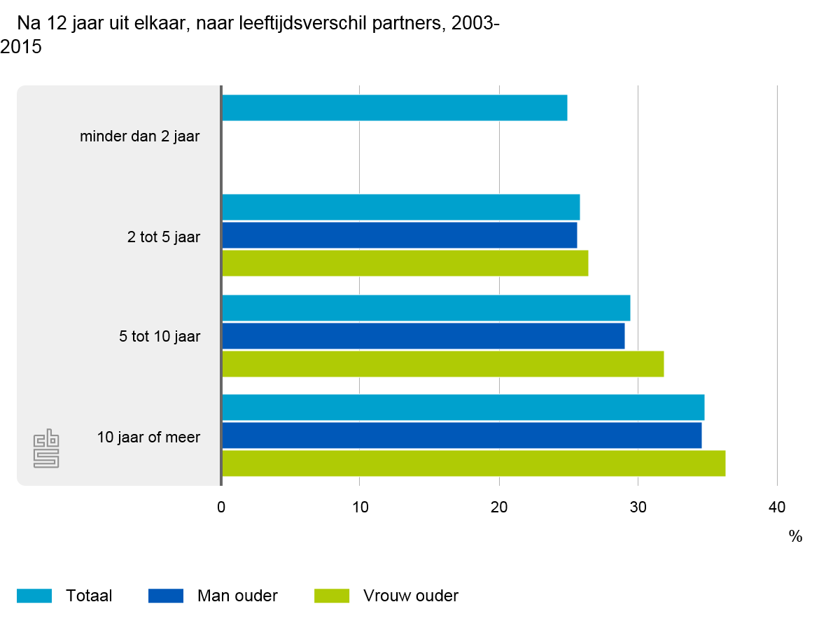 Na 12 jaar uit elkaar